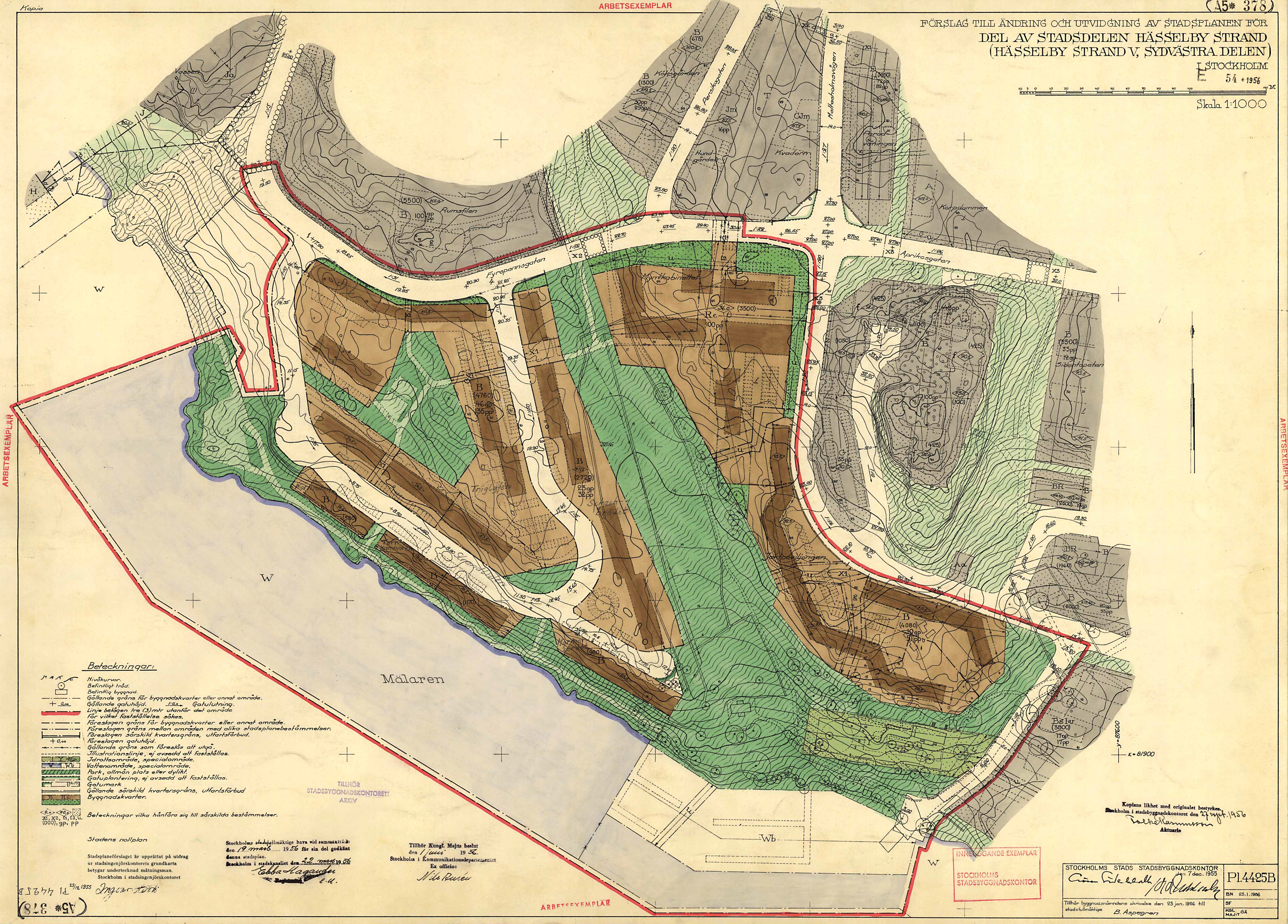 Stadsplan Pl. 4425B för Strandliden mm